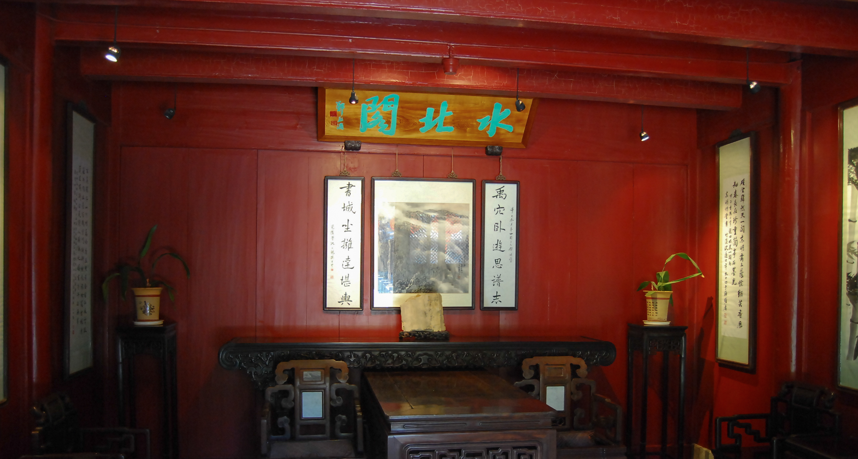 中文（中国大陆）: 天一阁：水北阁